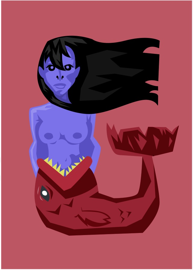 Imaxe que mostra unha interpretación libre do ser da mitoloxía galega coñecido como Xacia